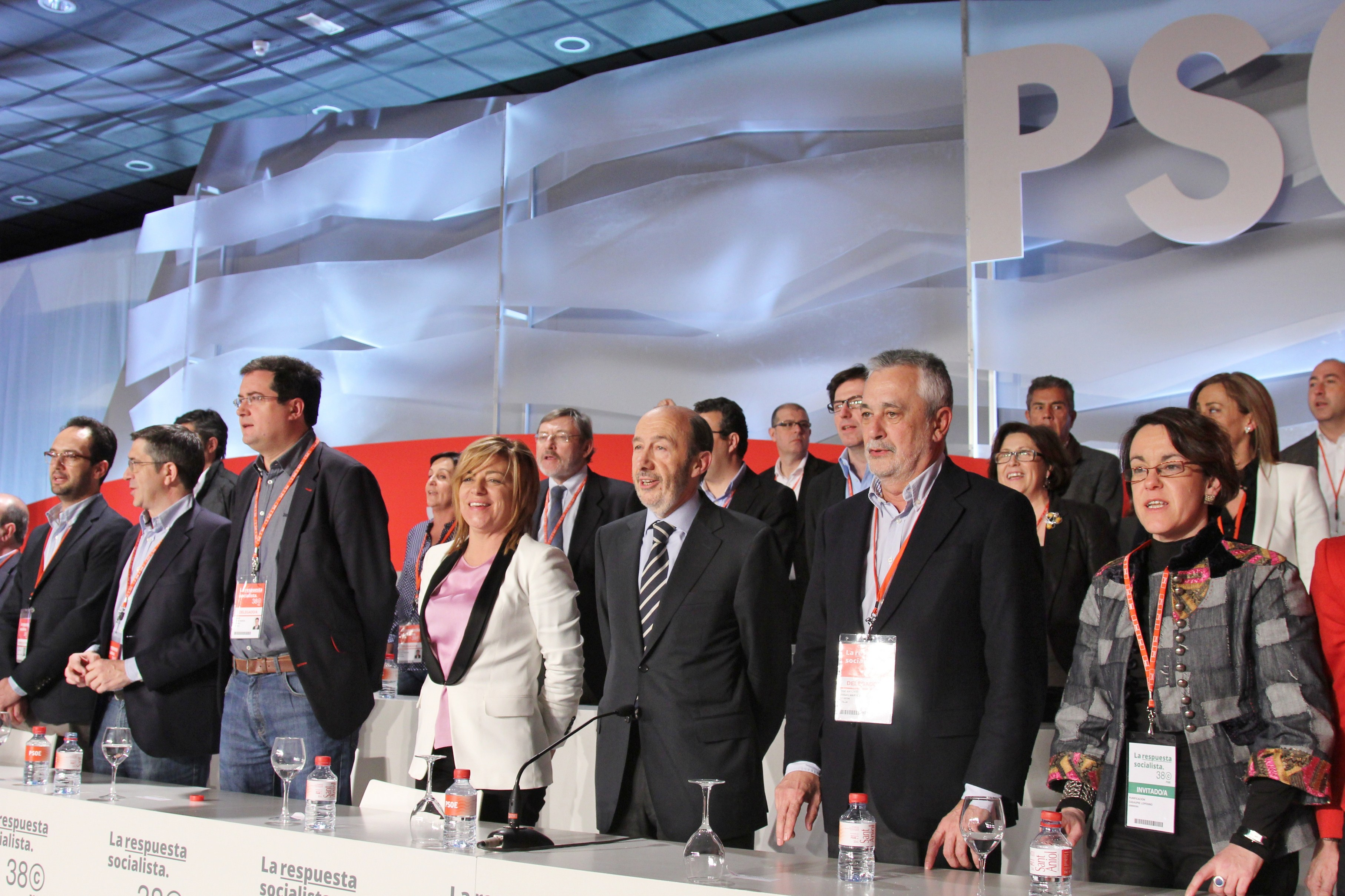 Les nouveaux membres de la commission exécutive du PSOE entourent Alfredo Pérez Rubalcaba nouvellement élu secrétaire général fédéral.